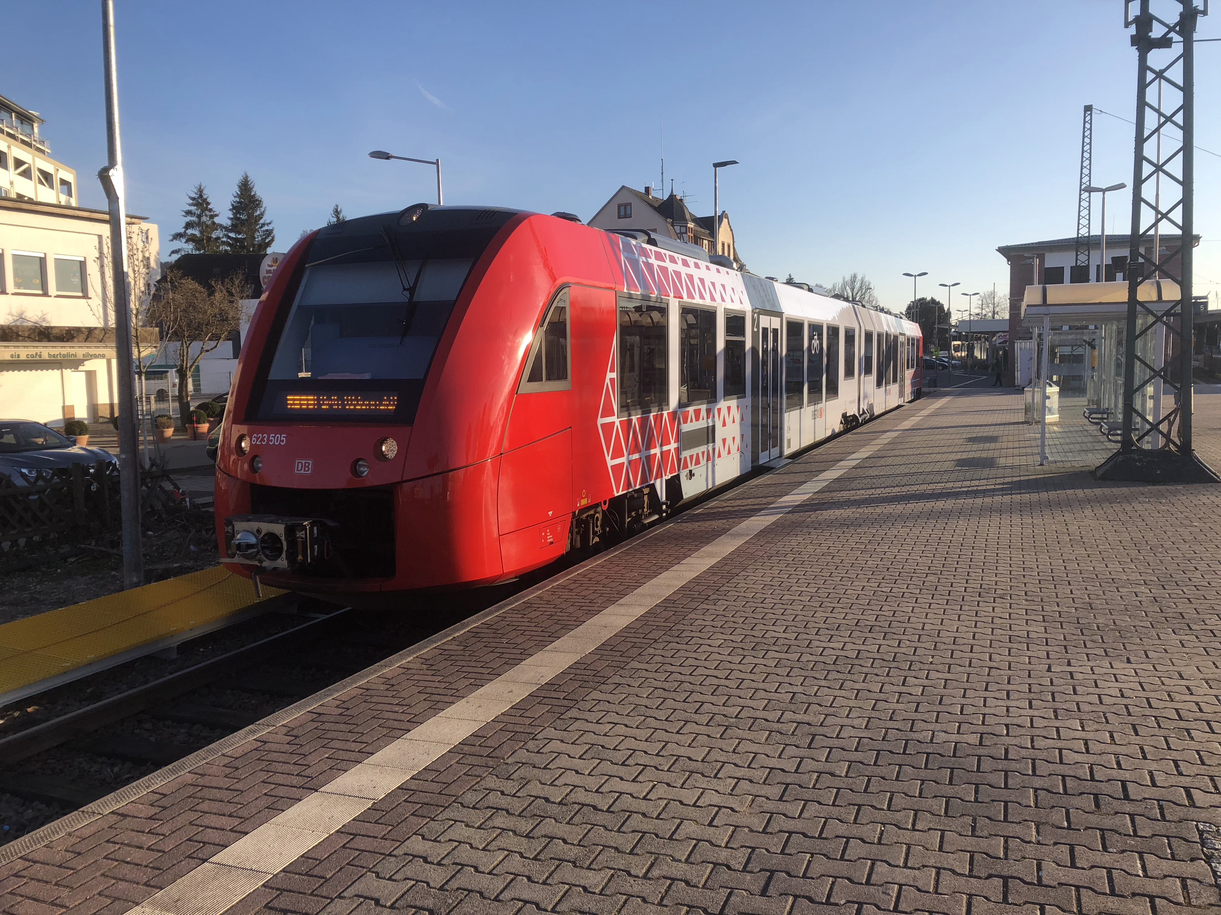 Alstom Coradia LINT 41 Dieseltriebwagen 623 505 in Weinheim Bergstraße